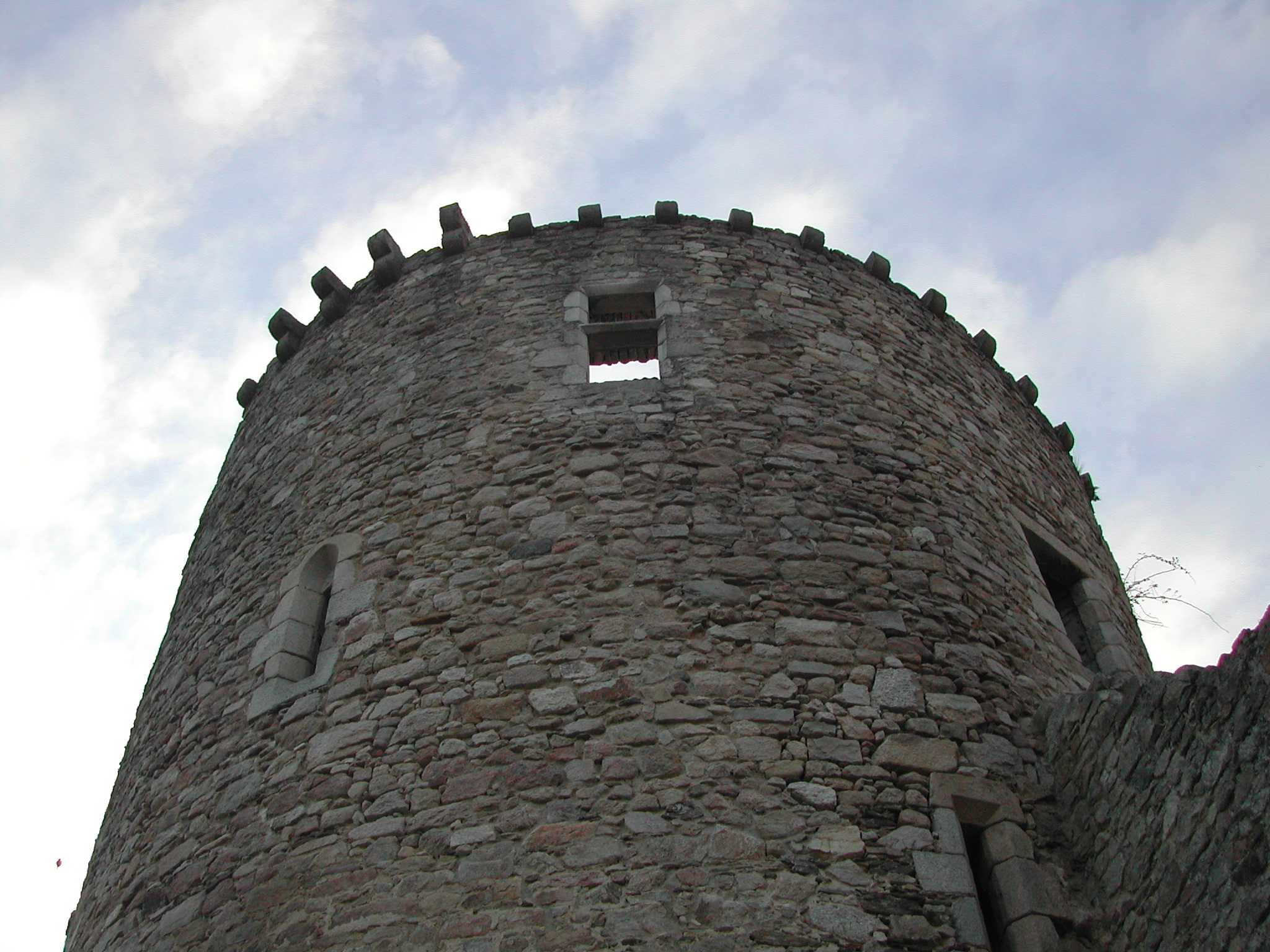 Photo de la Tour du château de Lastour, presque seul vestige du château médiéval.